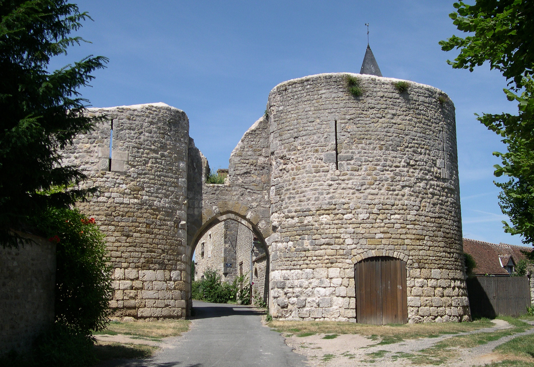 France Loiret Yèvre-le-Châtel Le château Photographie prise par GIRAUD Patrick